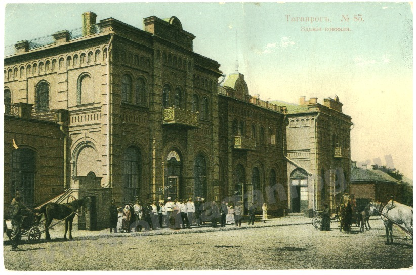 Здание железнодорожного вокзала, Таганрог Ростовская область РФ